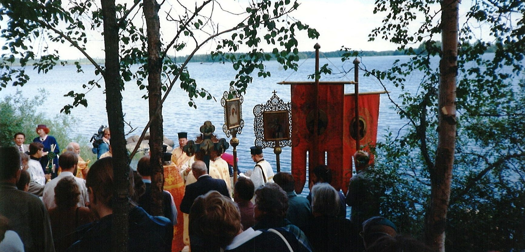 Högtiden Ilja praasniekka i kyrkobyn i Ilomants (Pogosta), Karelen 19-20 juli 1996. Korsprocession är nere vid sjön Ilomantsin järvi.